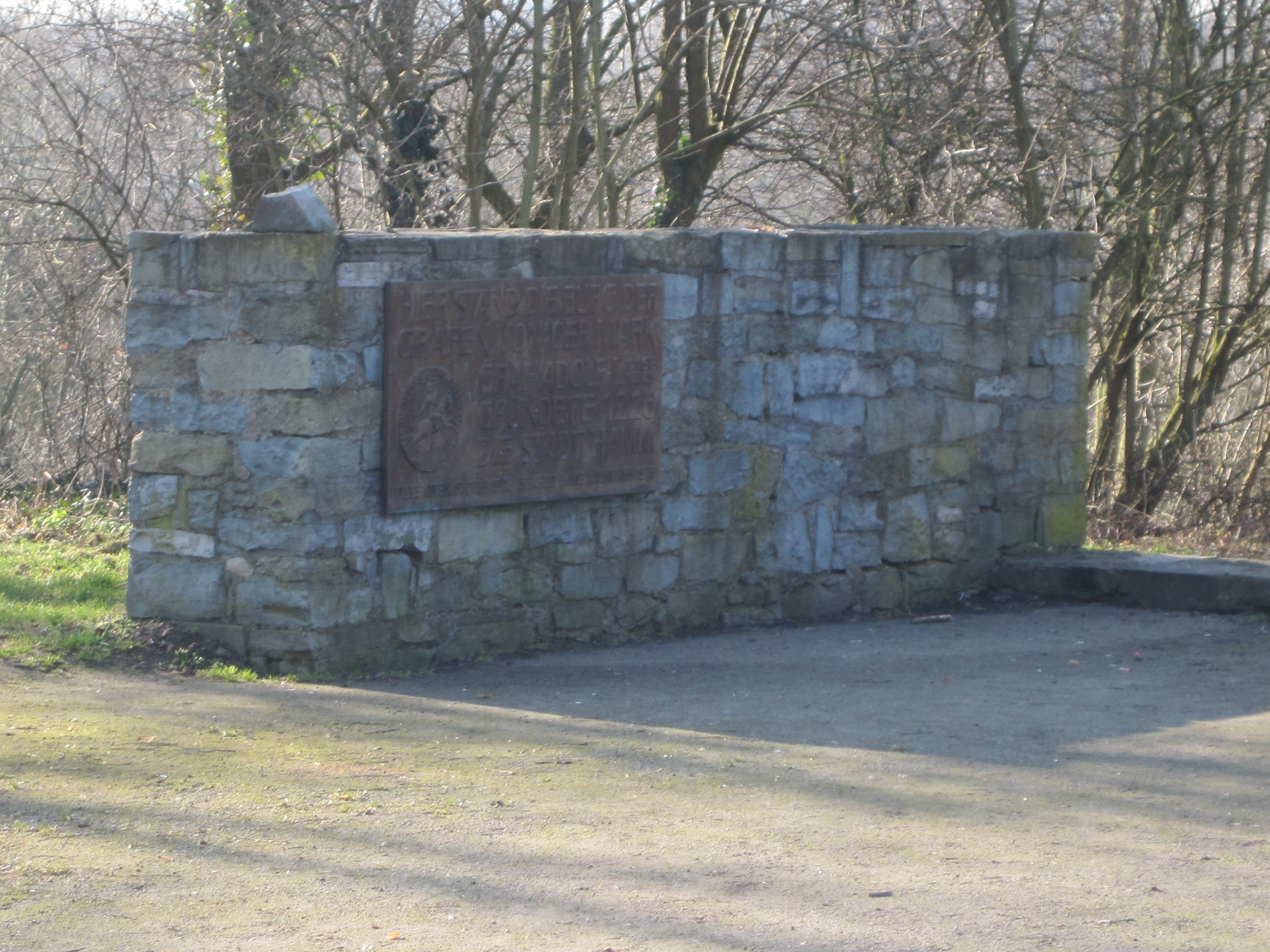 Dieses Foto zeigt ein kurzes Mauerstück, auf dem eine Gedenkplatte angebracht ist. Es befindet sich auf der Hauptburg des Burghügels von Hamm-Mark und symbolisiert den ehemals hier befindlichen Palas der Burg. Die Gedenktafel erinnert an die Gründung der Stadt Hamm durch den Burgbesitzer Adolf I. Graf von der Mark.